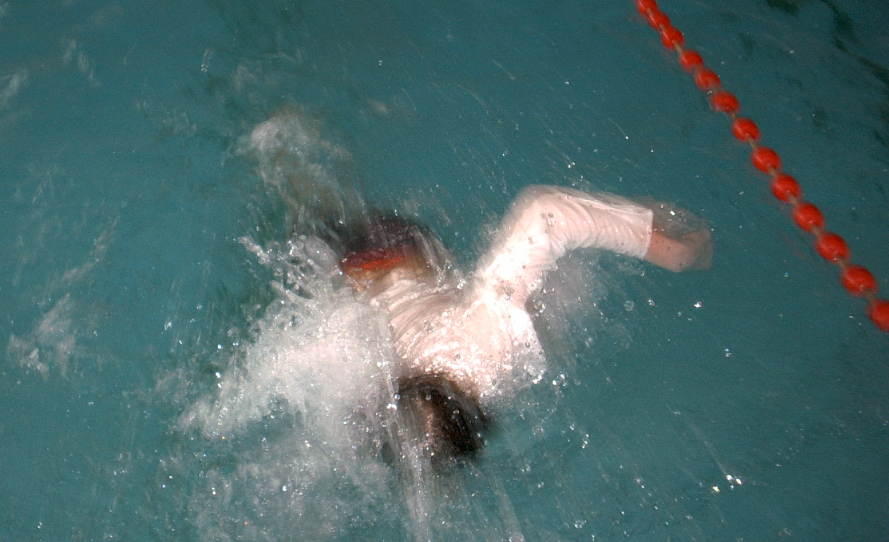 Kleiderschwimmer